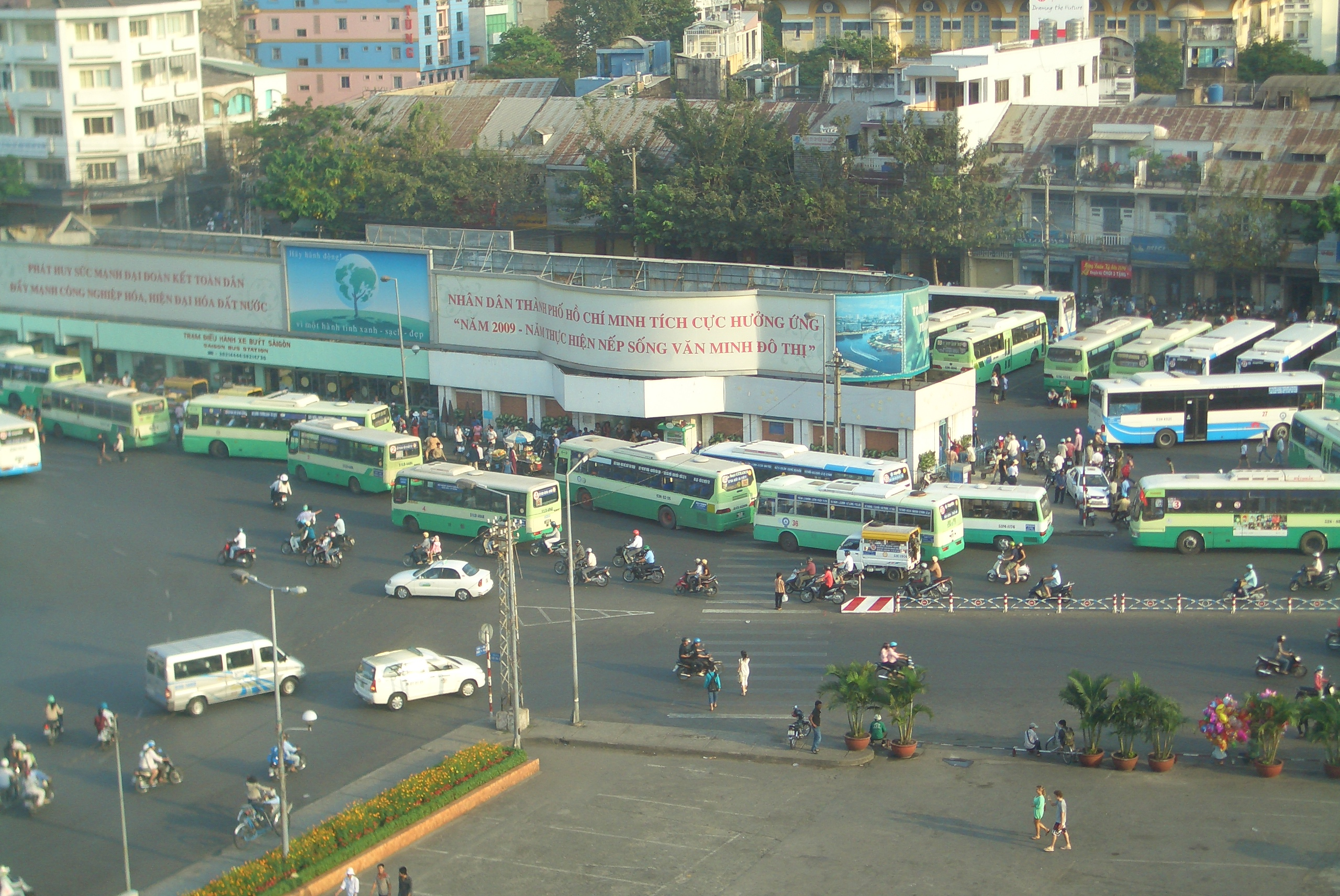 Saigon en vrac / Photo prise au travers de la vitre de ma 2iem chambre. Ho Chi Minh City Bus Station